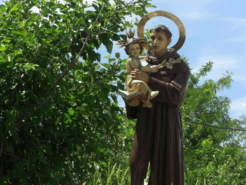 Patrón de Las Almontaras por las calles del pueblo.